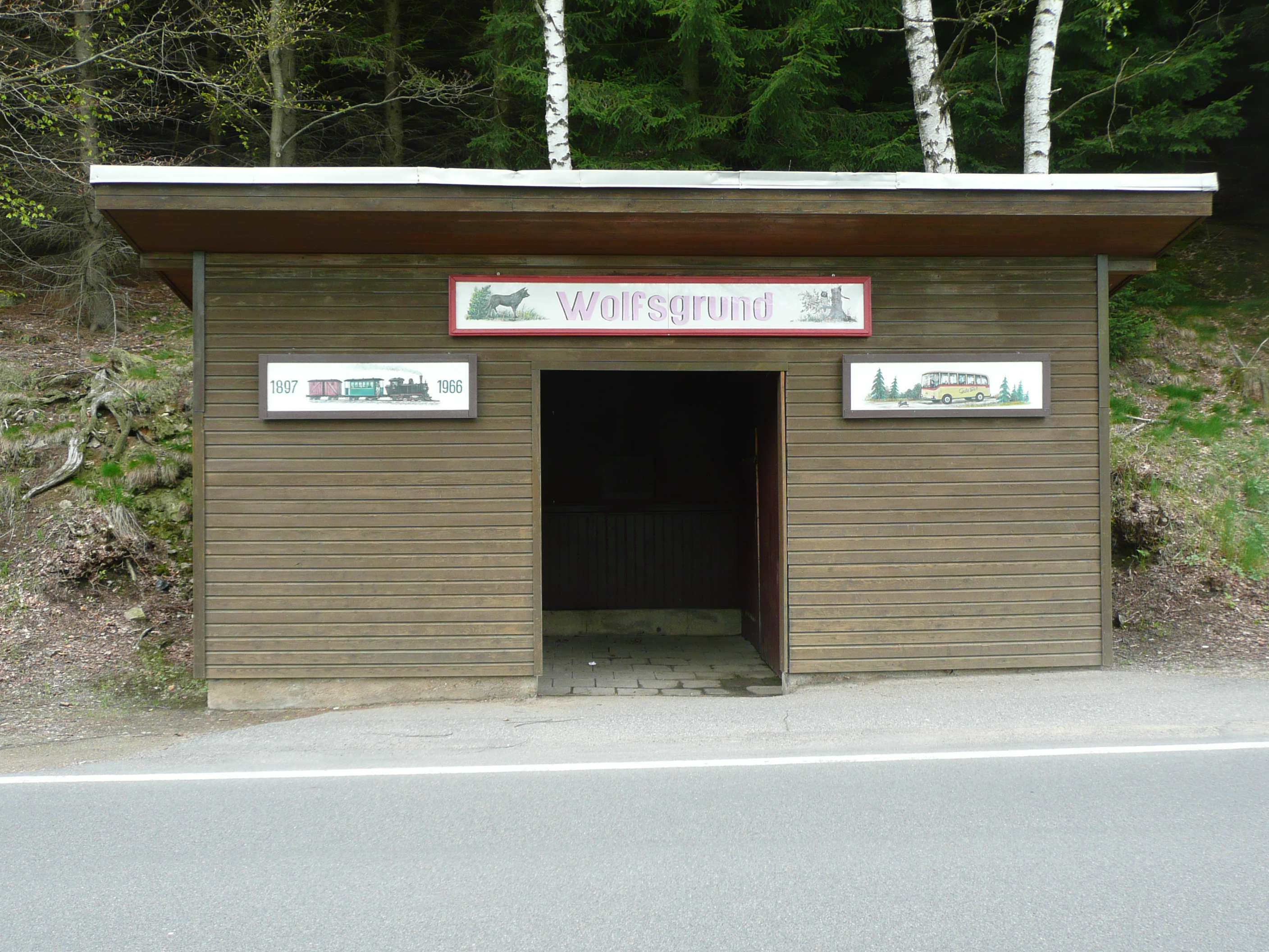 Foto der erhaltenen Wartehalle Wolfsgrund